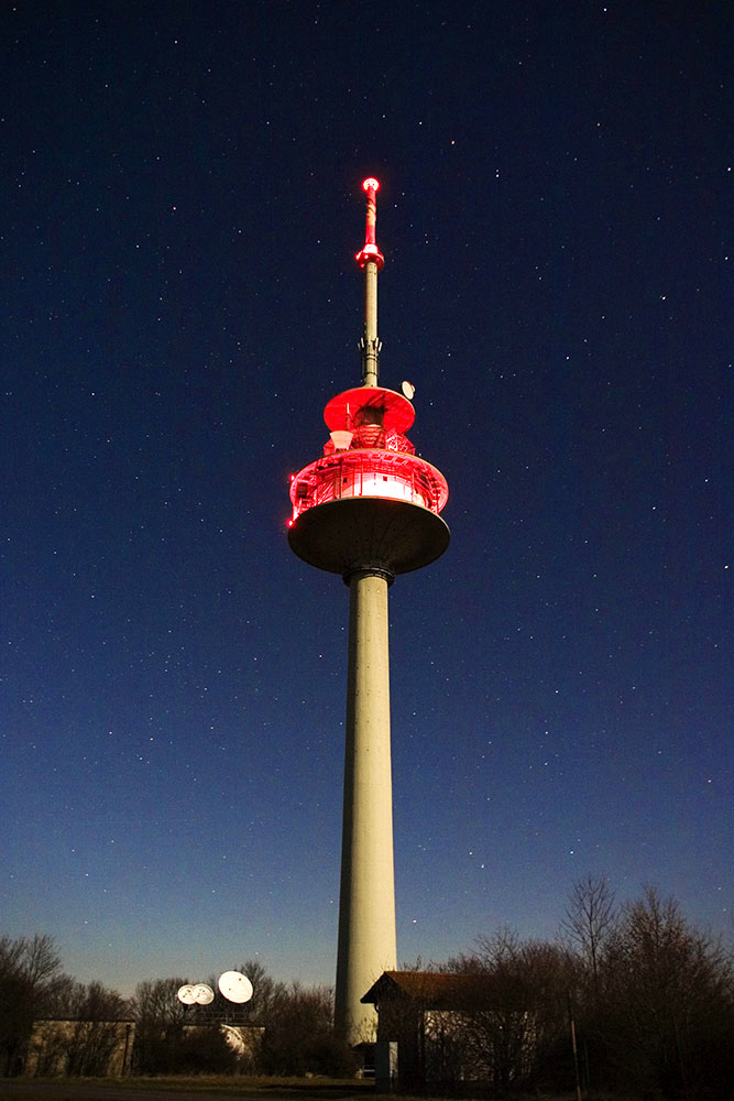 Nachtaufnahme Fernsehturm in Schnaitsee, Lkr. TS, Bayern